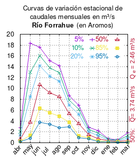 Curvas de variación estacional del río Forrahue en Aromos. # Dirección General de Aguas # Diagnóstico y clasificación de los cursos y cuerpos de agua según objetivos de calidad. Cuenca del río Bueno. # Santiago de Chile # Ministerio de Obras Públicas (Chile) # 2004 # url: # urlarchivo: # Tabla 4.7: Río Forrahue en Aromos (m3/s), pág. 52 mes 5% 10% 20% 50% 85% 95% abr 2.78 2.01 1.36 0.65 0.26 0.15 may 18.36 12.98 8.52 3.82 1.42 0.79 jun 17.61 16.08 14.23 10.69 6.33 3.77 jul 15.10 13.80 12.24 9.25 5.56 3.39 ago 14.18 12.92 11.38 8.45 4.84 2.72 sep 8.65 7.84 6.93 5.39 3.79 2.98 oct 6.95 6.18 5.25 3.47 1.28 0.91 nov 2.90 2.49 2.07 1.45 0.93 0.72 dic 2.21 1.72 1.26 0.70 0.34 0.22 ene 0.71 0.61 0.50 0.34 0.22 0.17 feb 0.54 0.46 0.39 0.28 0.18 0.13 mar 1.80 1.28 0.84 0.38 0.13 0.07 This plot was created with Gnuplot.